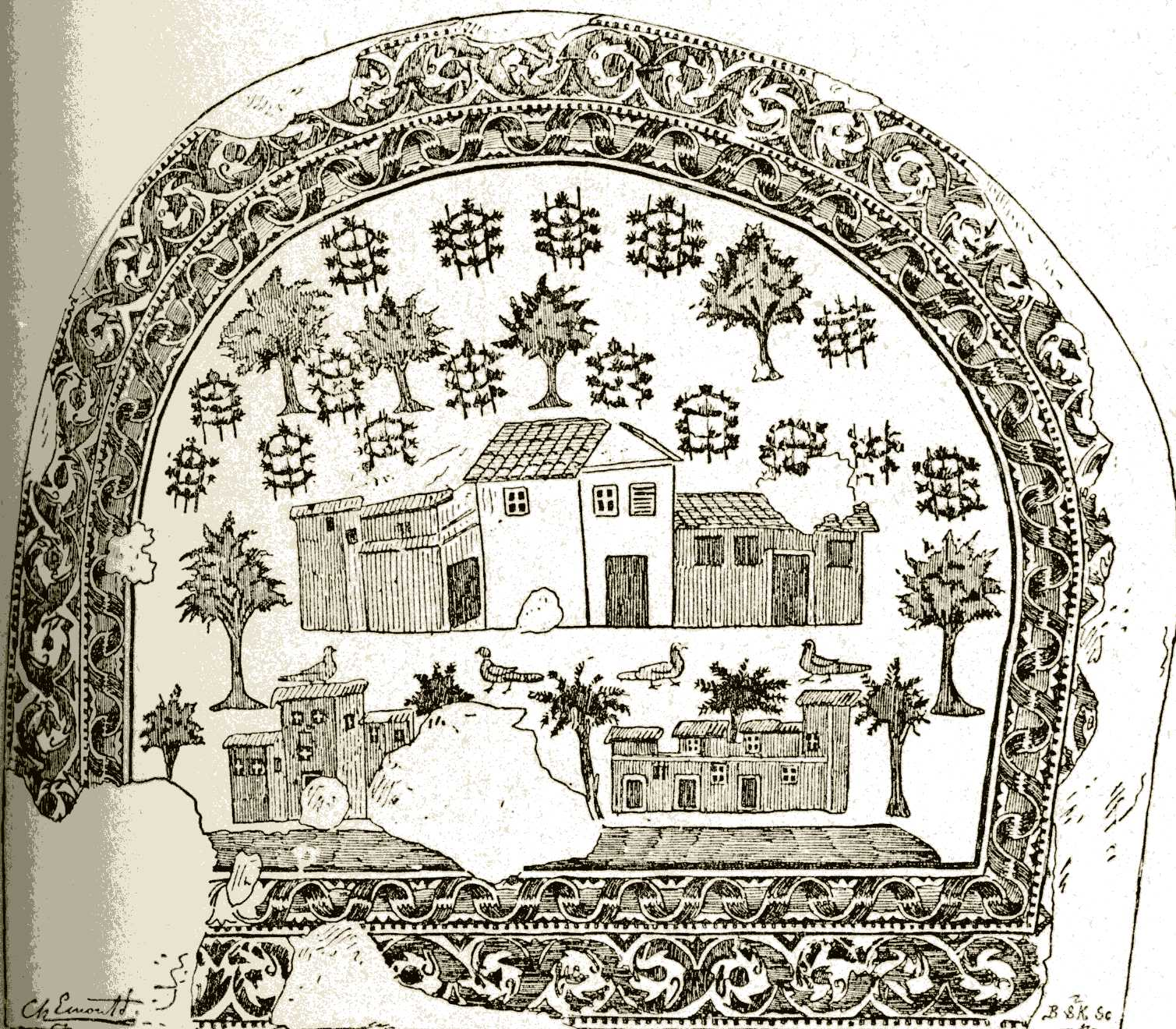 Une villa sur une mosaïque de Tabarka